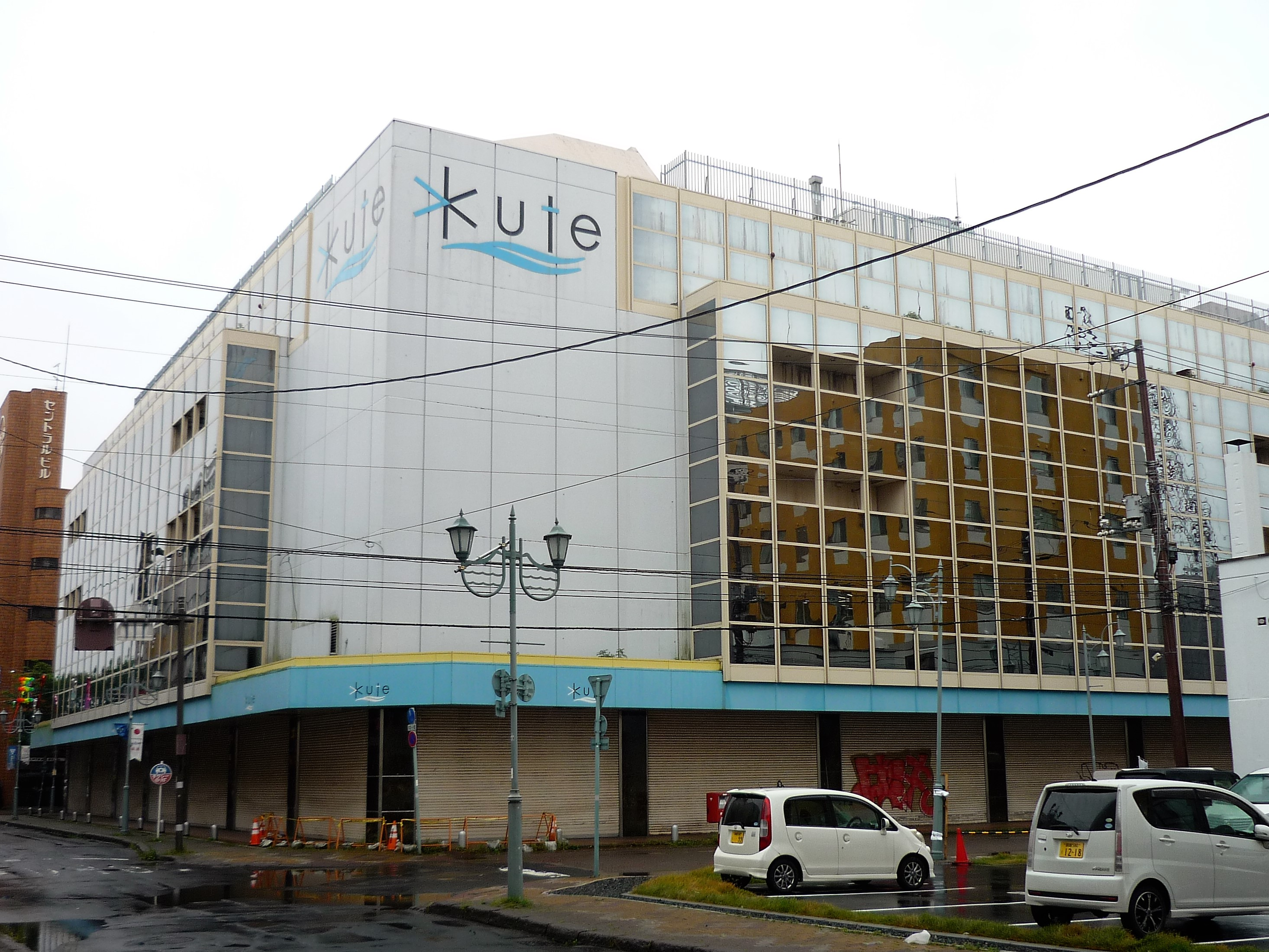 釧路市末広町にある旧・丸井今井釧路店本館。2006年閉店後転売され、「kute」として再開店予定も頓挫し放置 Panasonic Lumix DMC-FS3